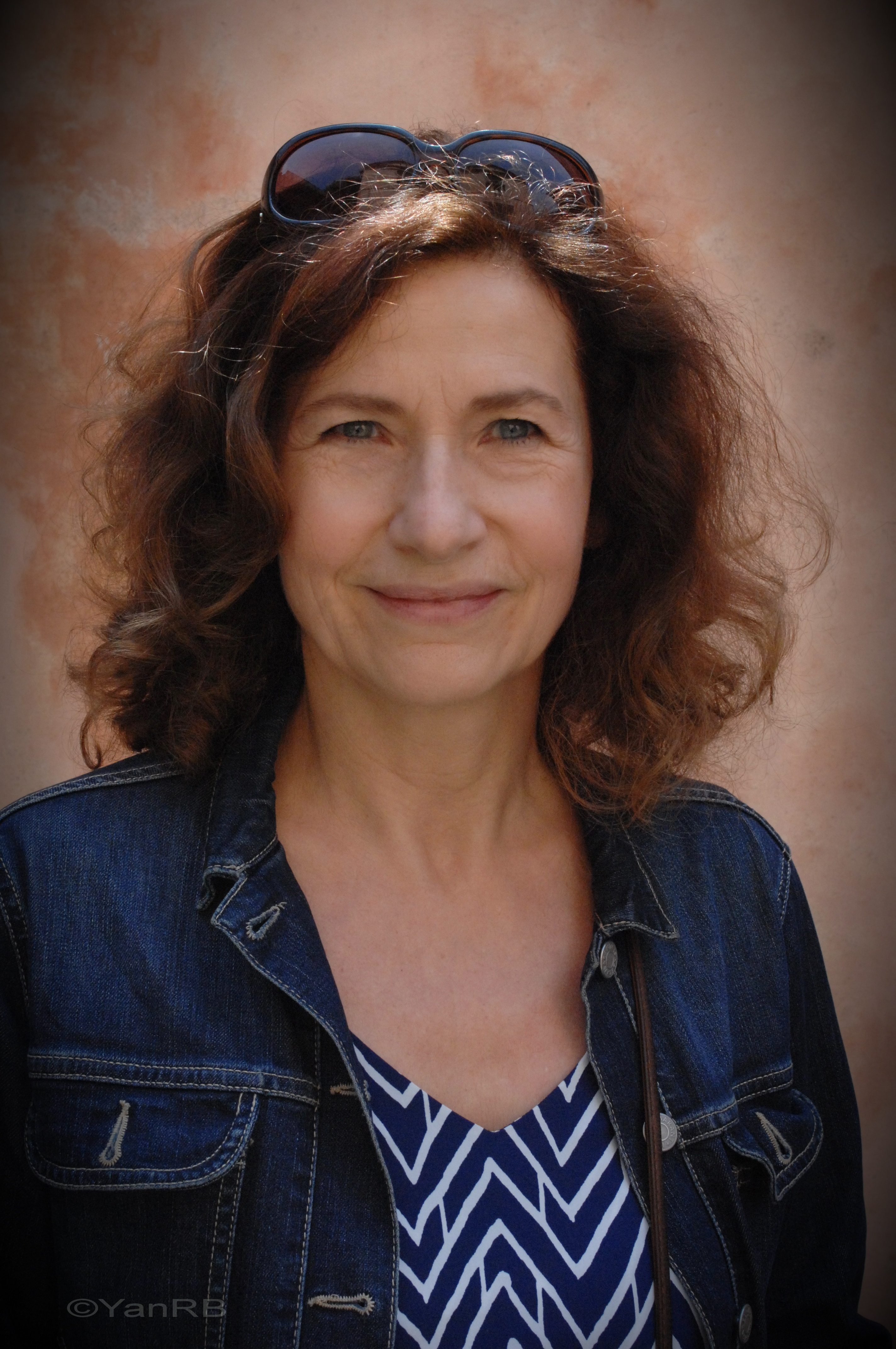 Marie Bunel au Marathon des mots 2016 à Toulouse